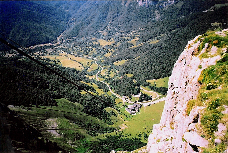 Fuente Dé, en los Picos de Europa (Cantabria, España). Vista de la estación inferior del teleférico.